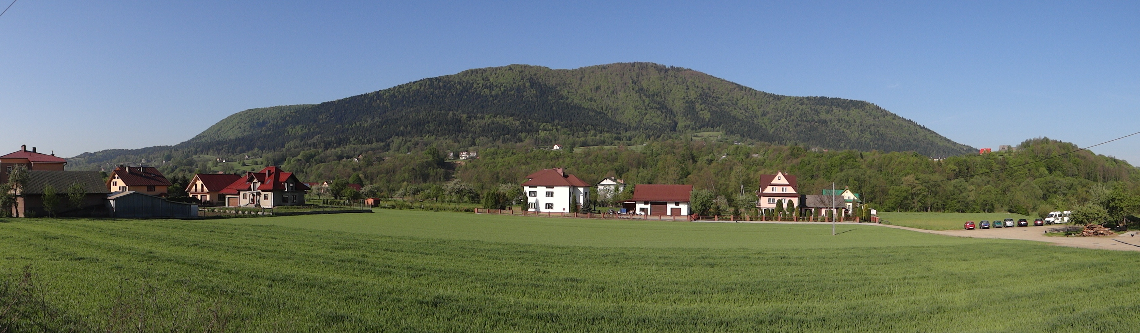 Szczebel - panorama z Kasinki Małej